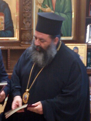 Μητροπολίτης Λαγκαδά Ιωάννης Τασσίας